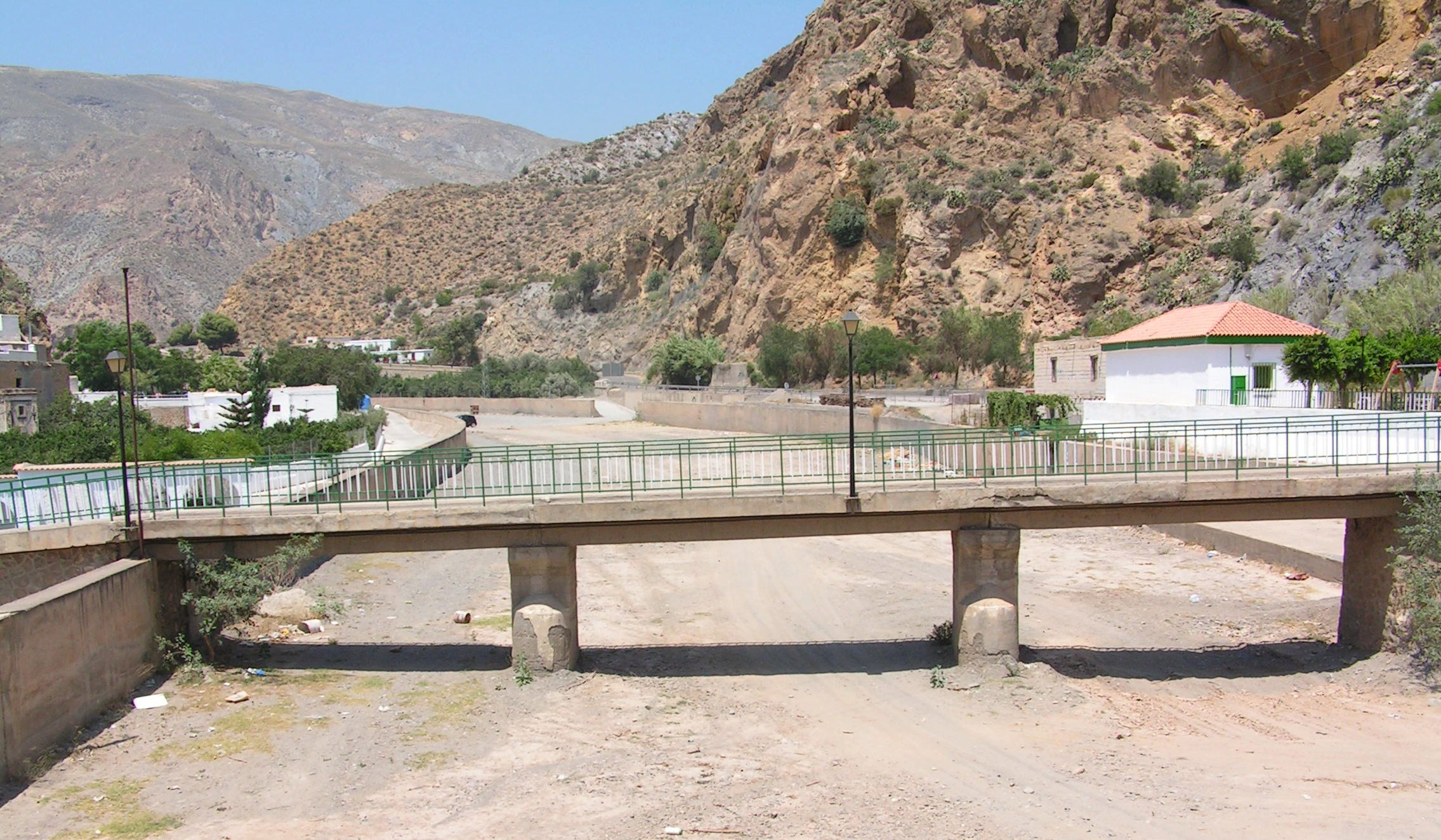 Rambla seca en Almería (España)